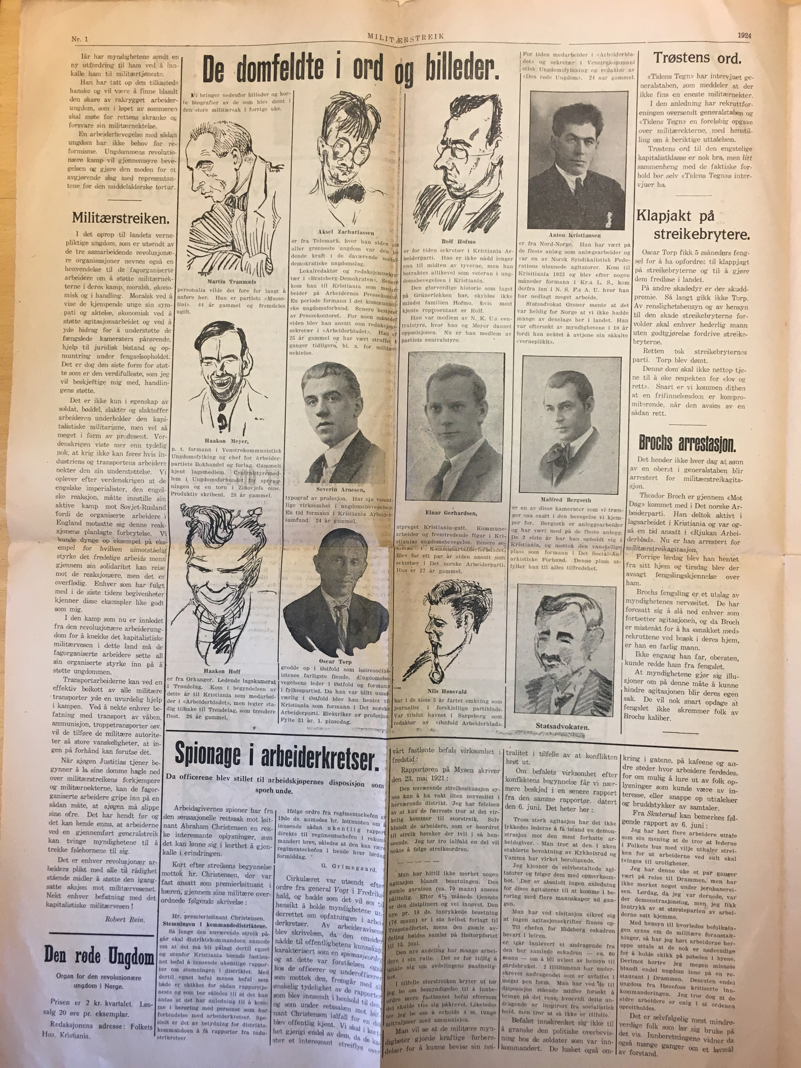 Fra politisk pamflett i 1924. Oversikt over de dømte i den såkalte "Militærstreiksaken": Martin Tranmæl, Axel Zachariassen, Rolf Hofmo, Anton Kristiansen, Haakon Meyer, Severin Arnesen, Einar Gerhardsen, Malfred Bergseth, Haakon Hoff, Oscar Torp og Nils Hønsvald.